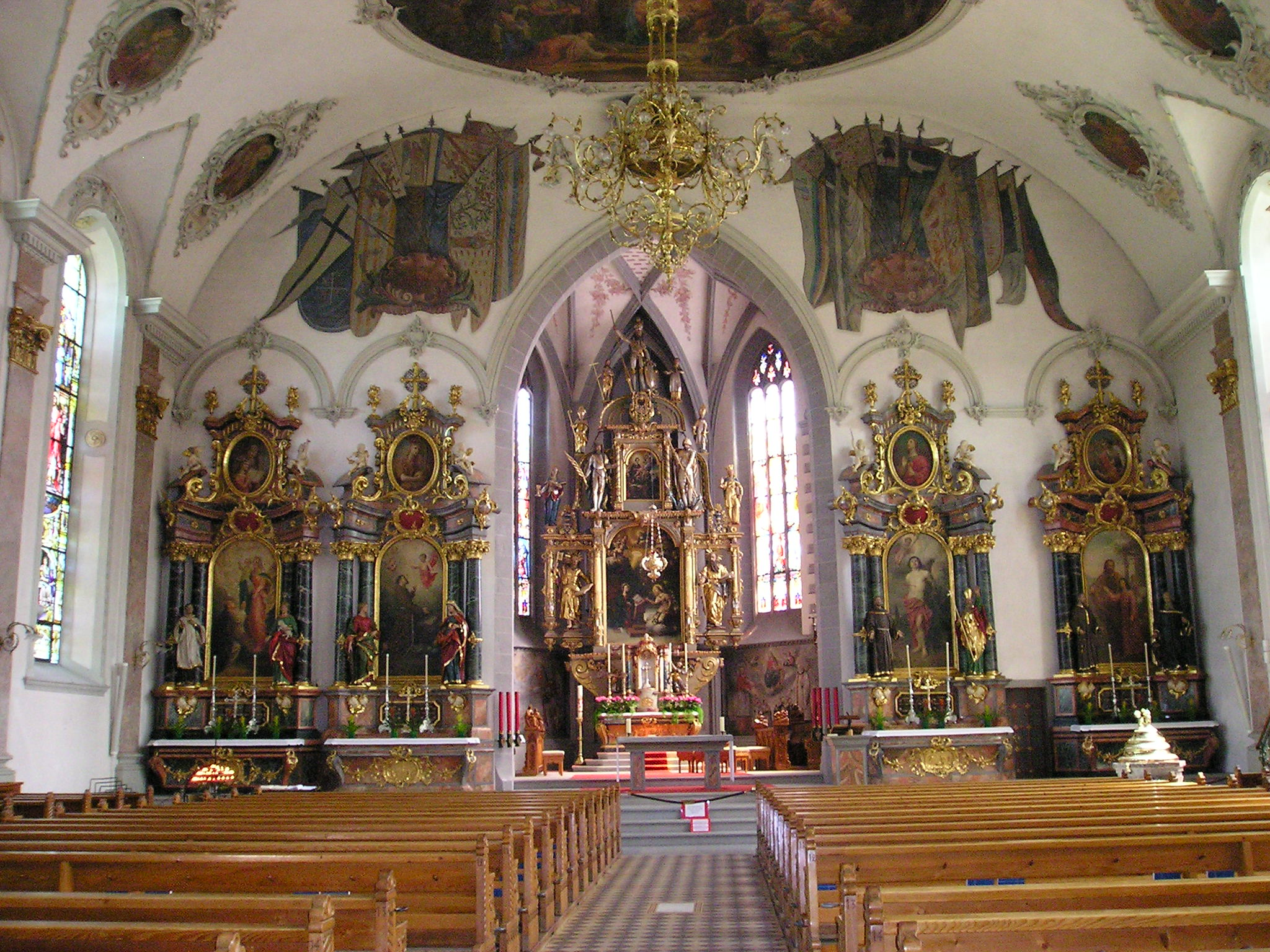 Kircheninneres St. Mauritius in Appenzell